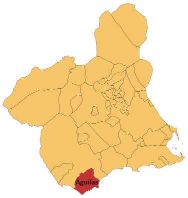 Es detalla on està ubicat Águilas